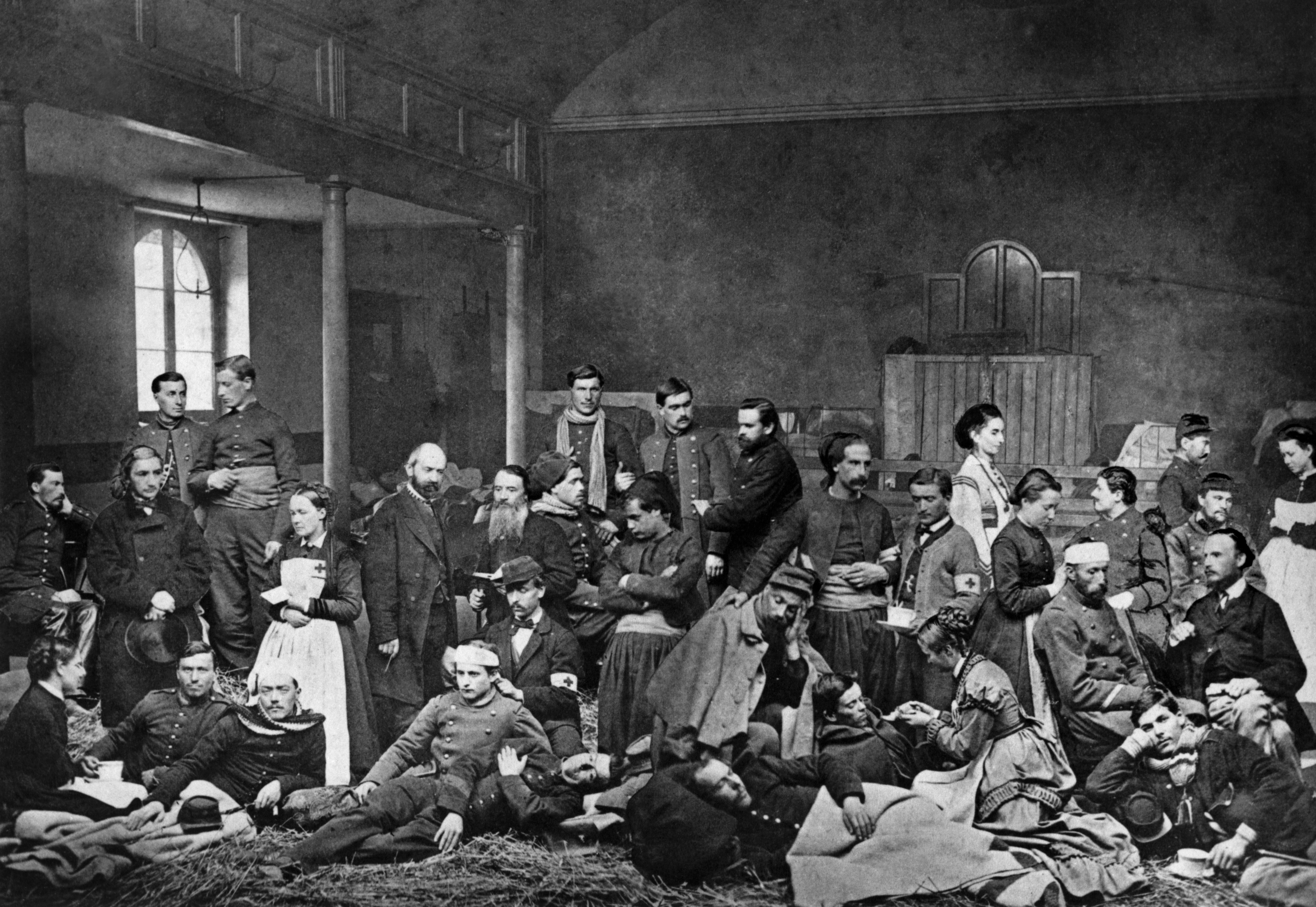 Guerre franco-prussienne, 1870-1871 - Lausanne, chapelle des Terreaux. Internés français blessés de l'armée de Bourbaki. A gauche, tenant son haut-de-forme à la main, le pasteur Bonnard, de l’Église réformée vaudoise. A sa gauche, avec un tablier blanc à croix rouge, Mme Élise Panchaud, première directrice de l’École d’infirmières La Source à Lausanne ; sur la gauche de celle-ci, le docteur Charles Marcel, médecin à Lausanne, volontaire au service de la section vaudoise de la Croix-Rouge suisse. Les autres personnages ne sont pas identifiés.